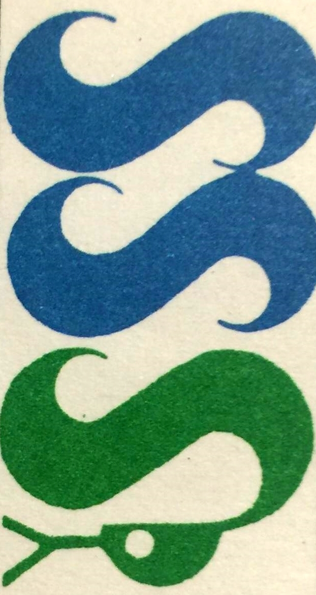 סמל המכון לרפואה ימית החל מ1976